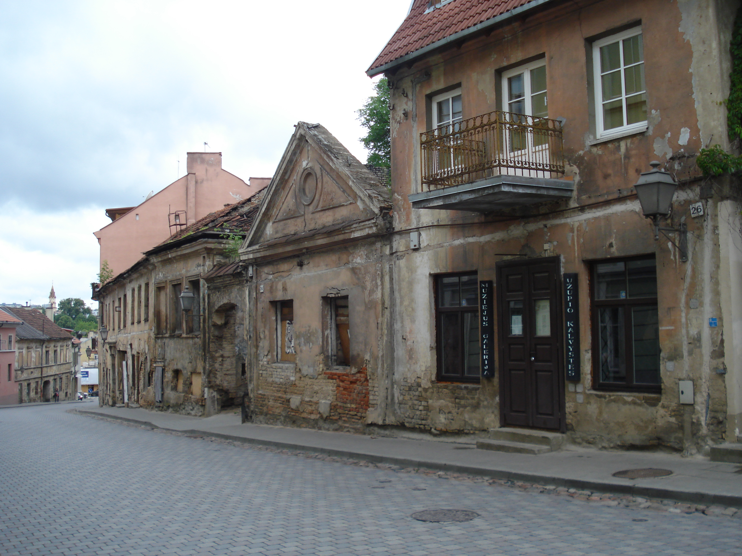 Užupio gatvė in Vilnius